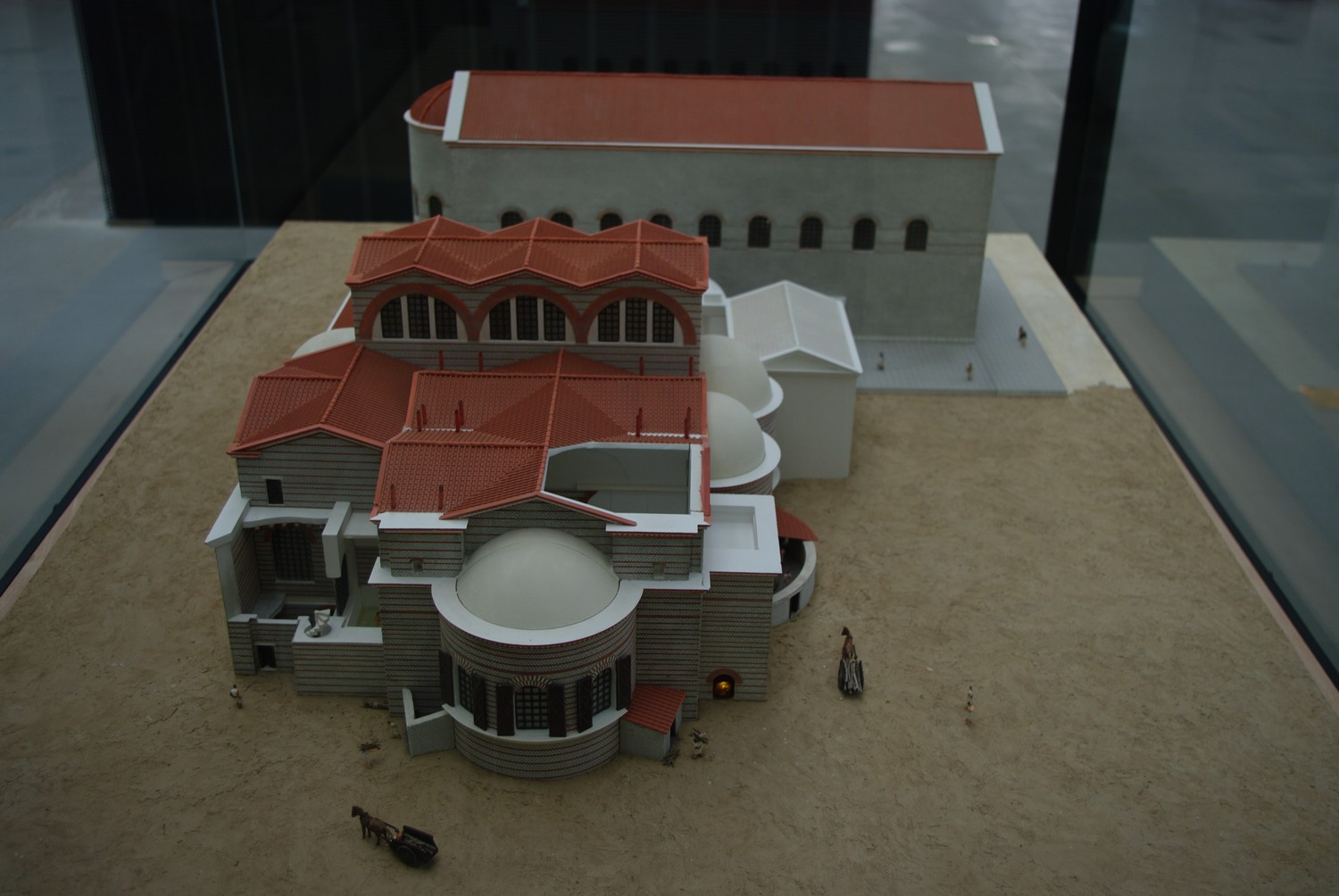 Maquette provenant du musée d'Arles Antique représentant les thermes de Constantin.